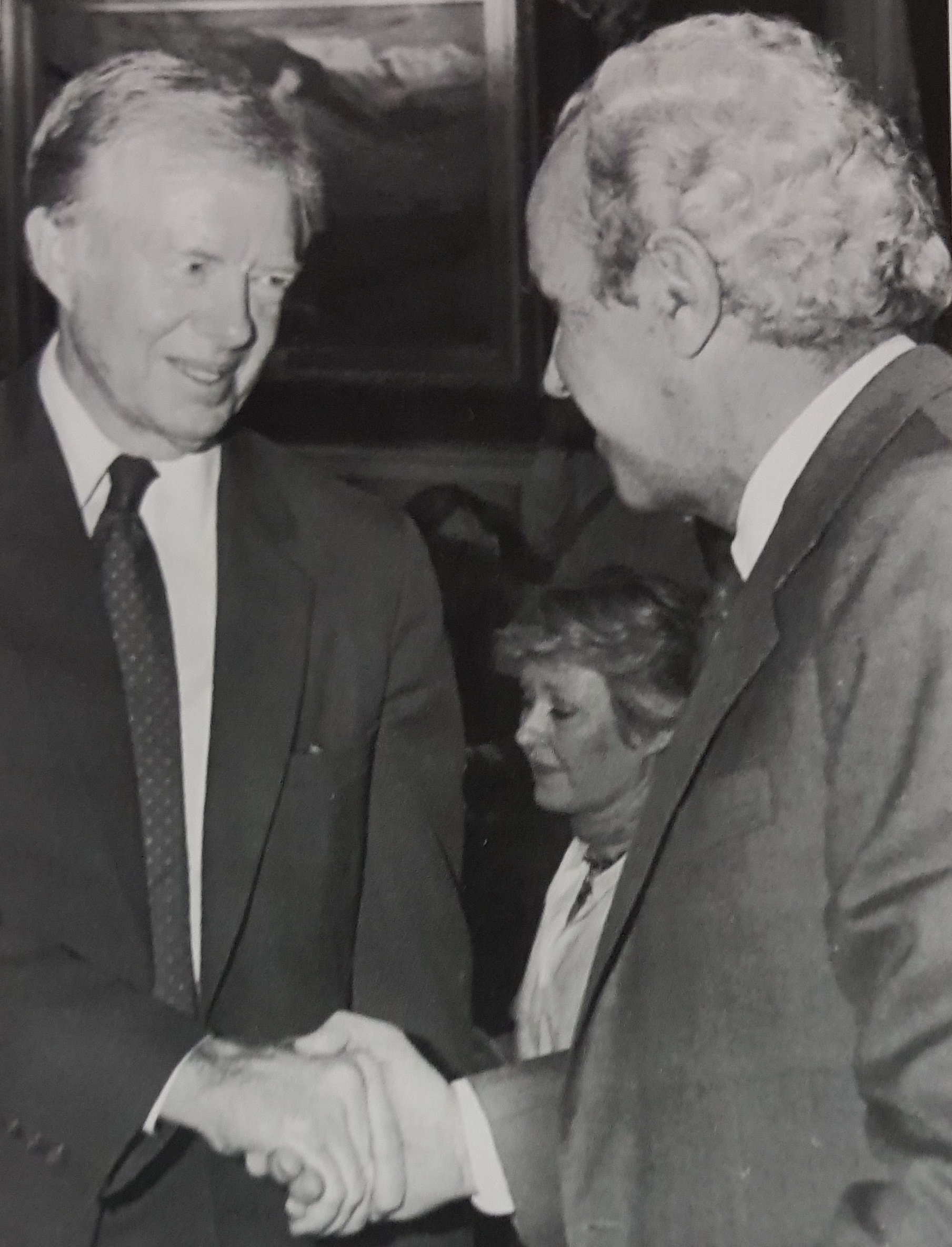 El expresidente de EEUU, James Carter, saluda al diputado Conte en el Congreso.